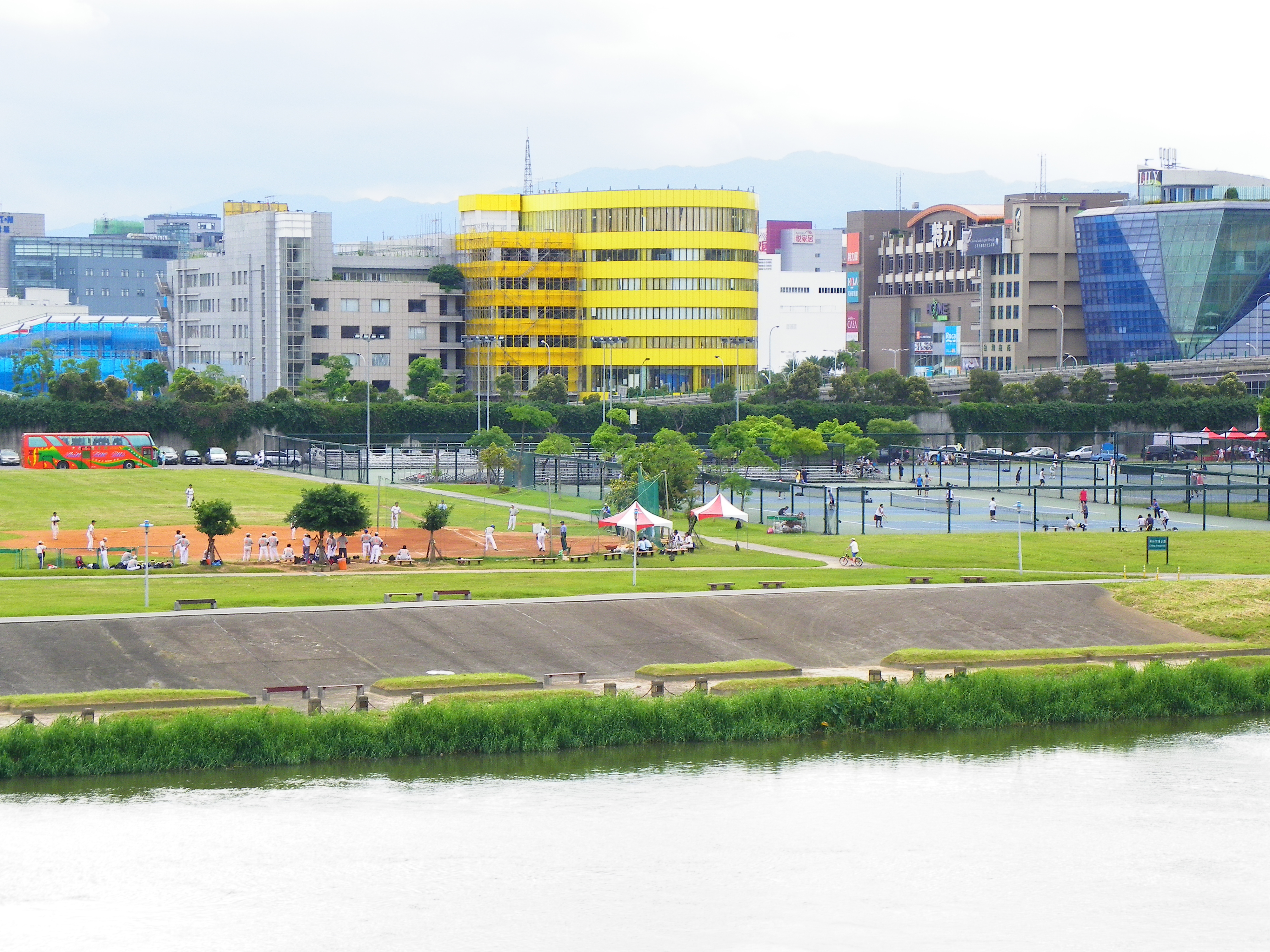 臺北市內湖區彩虹河濱公園棒球場（左）與網球場（右），遠方的黃色建築是擴建中的燦坤總公司。